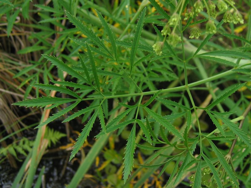 Wasserschierling Cicuta virosa, Müritz-Gebiet